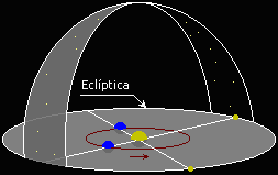 De